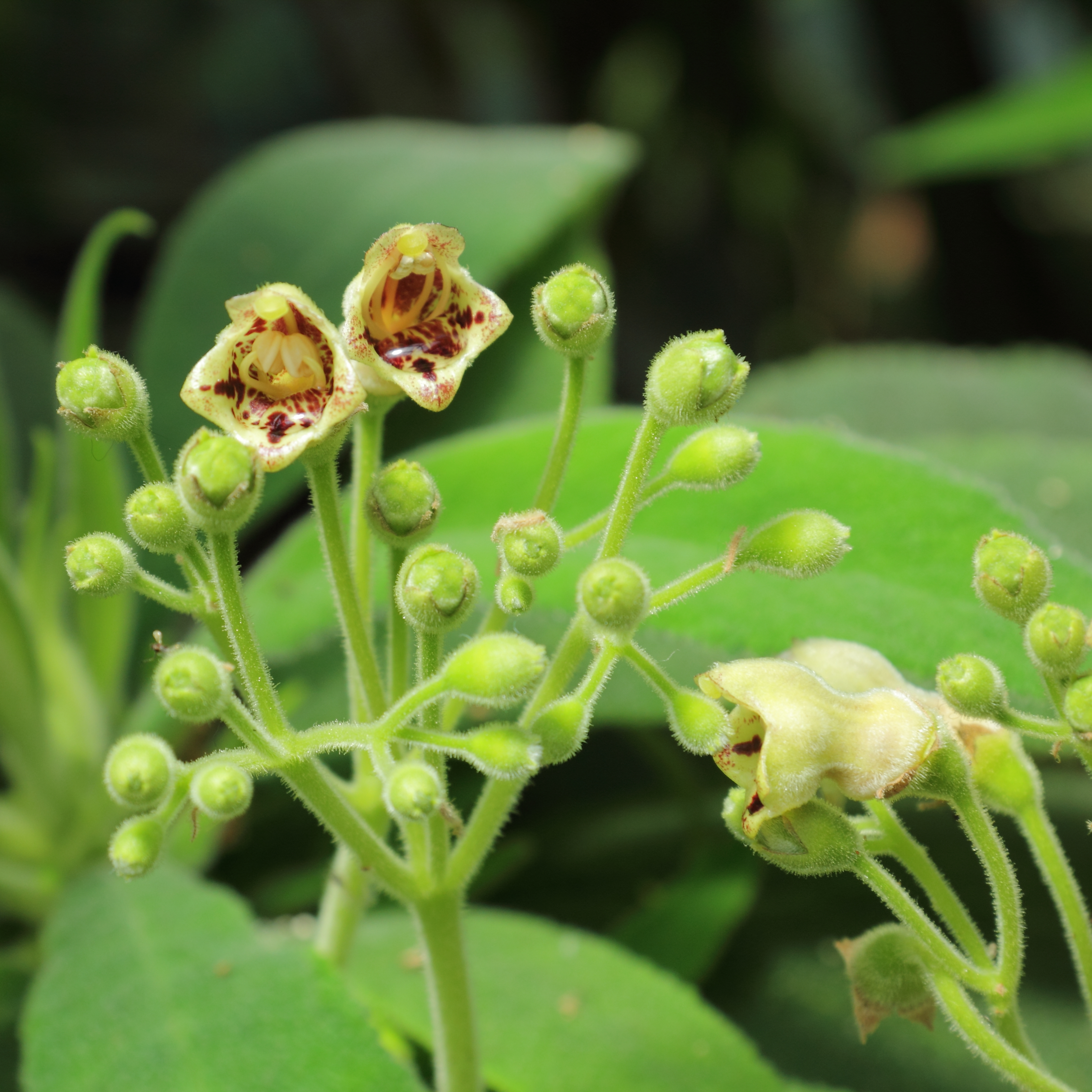 Rhytidophyllum exsertum, identifierad med hjälp av befintlig skylt vid Kew Gardens, London.